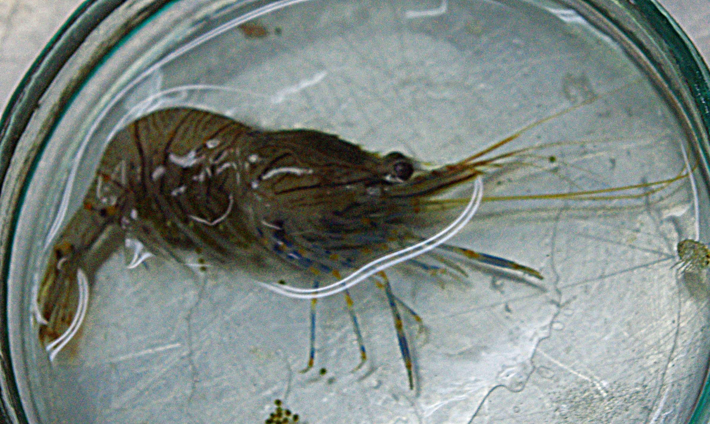 Krewetka atlantycka, złapana w Zatoce Gdańskiej